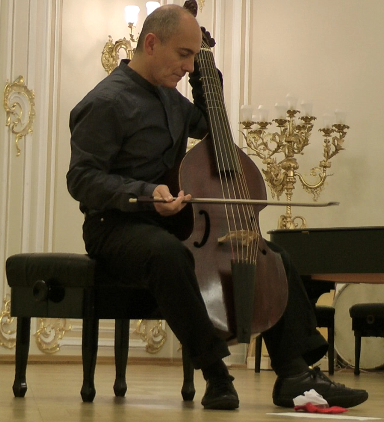 Паоло Пандольфо на фестивале Earlymusic-2013 в Санкт-Петербурге